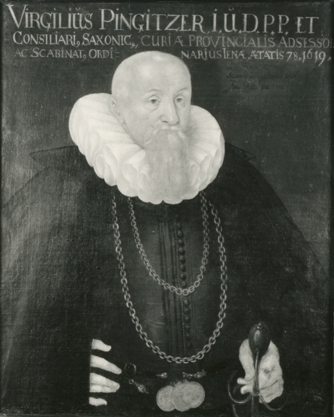 Portrait Virgil Pingitzer, a lawyer from Jena, Germany in 1619